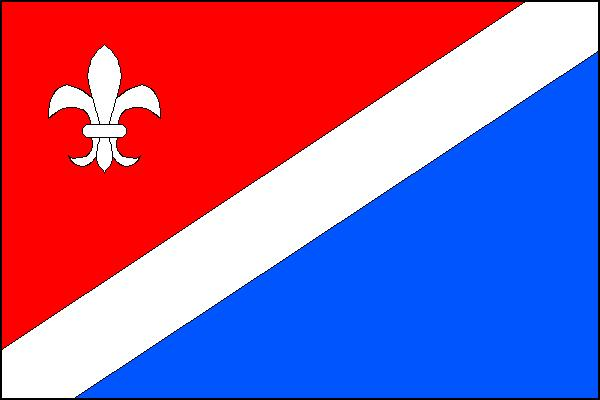 Vlajka města Seč (okres Chrudim)